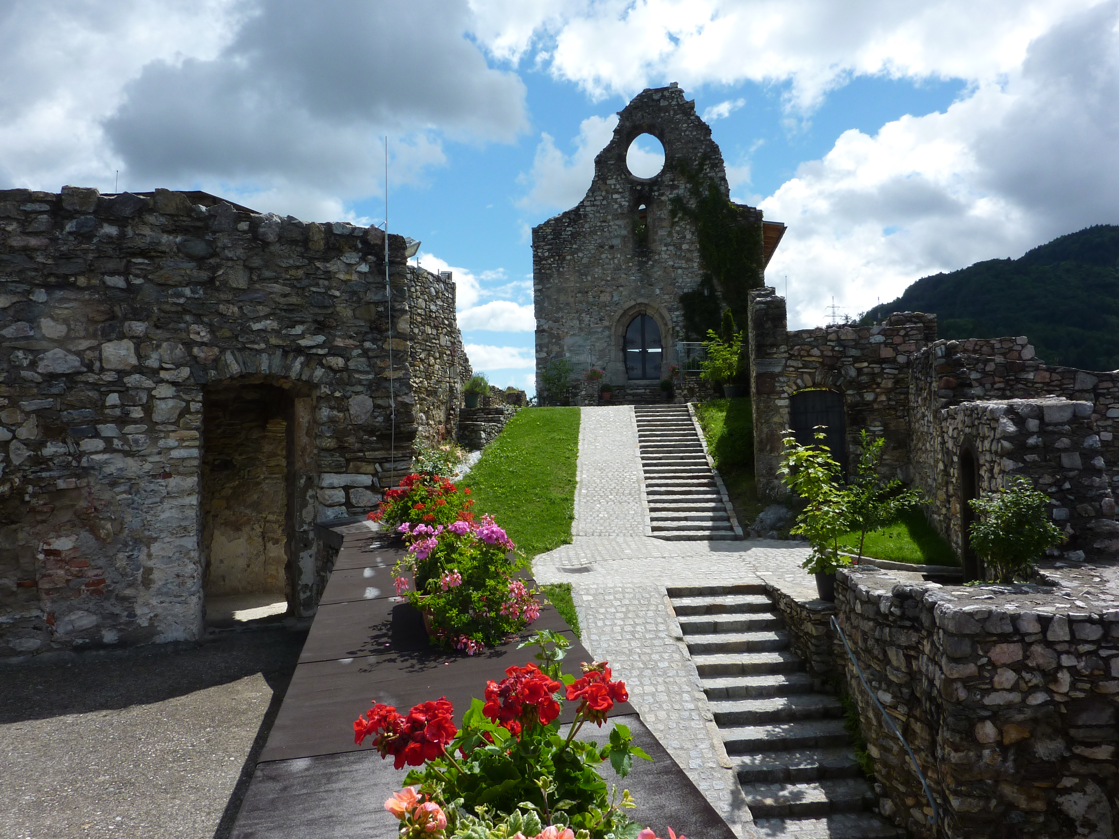 Klosterruine, Klosterweg 1, Arnoldstein, Kärnten, Österreich - Blick in Richtung der Fassade der ehem. Klosterkirche